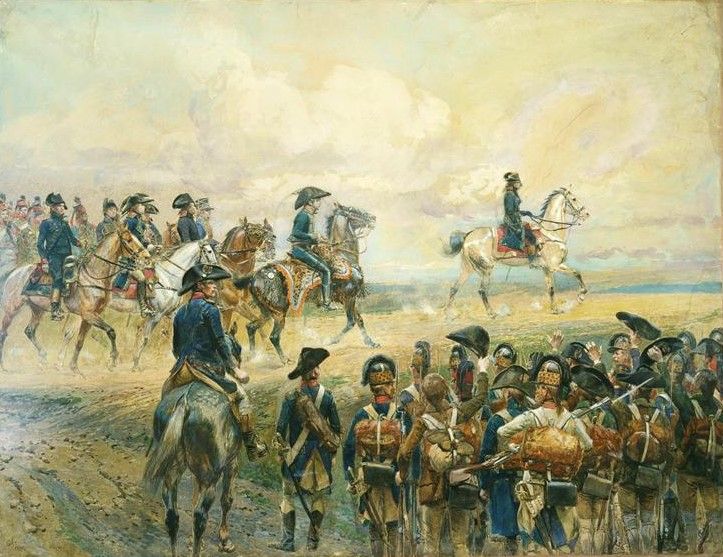 Bonaparte et son état-major pendant la campagne d'Italie en 1796.